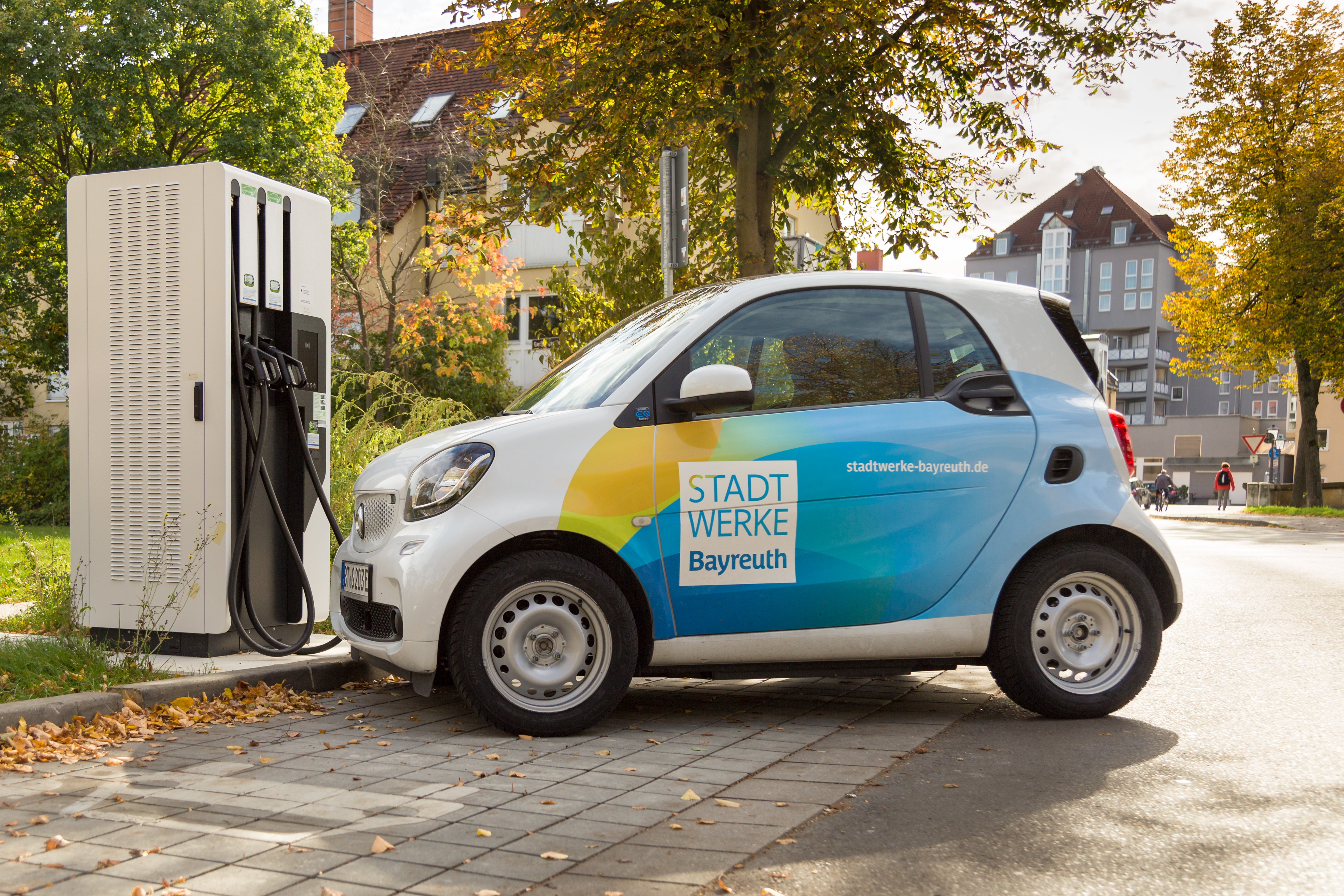 Die Stadtwerke Bayreuth betreiben neben deren Parkplatz am Sendelbach (gegenüber des Rotmain Centers) einen Schnelllader für E-Autos. Dort kann mit einer Ladeleistung von bis zu 50 Kilowatt getankt werden.